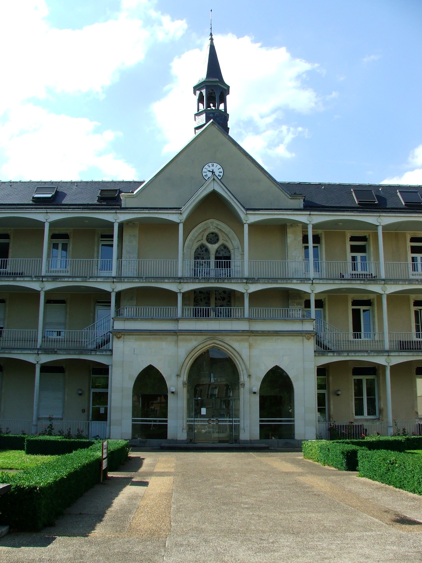 Lieu associatif permettant le déroulement des cours de l'université du temps. Ancien lieu de congrégation des sœurs mariannites au Mans.